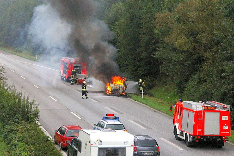 Brennender PKW